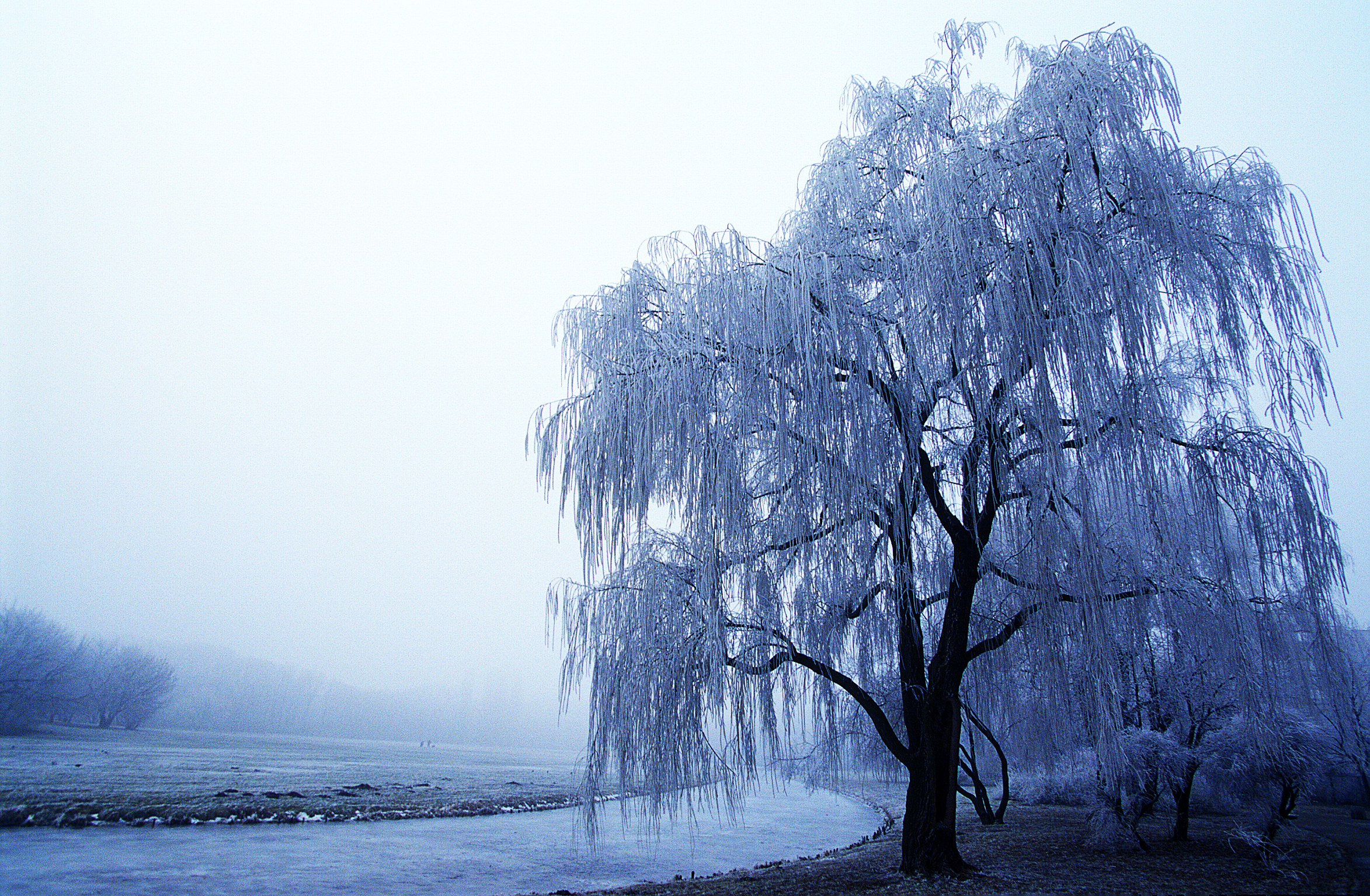 drzewa zimą w parku Skaryszewskim